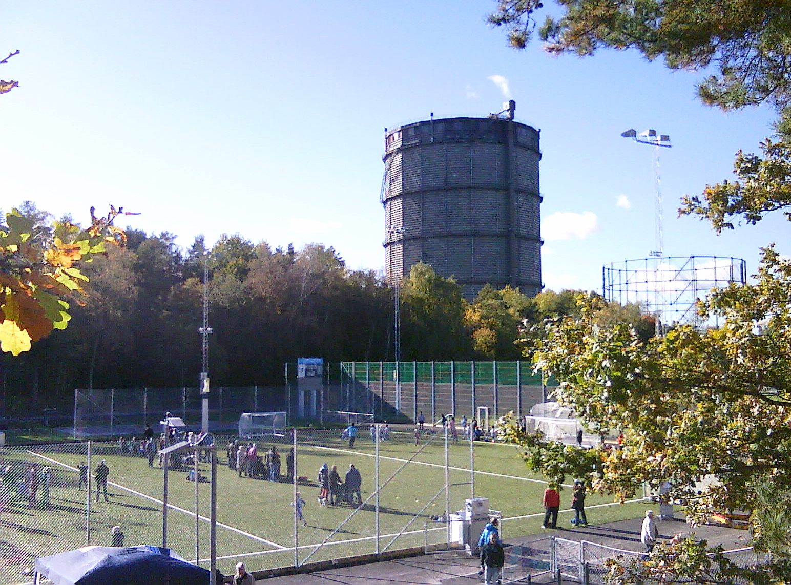 Invigning av Hjorthagens nya IP 2012.